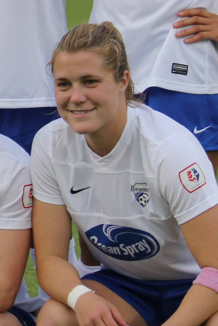 Katie Schoepfer (Boston Breakers)